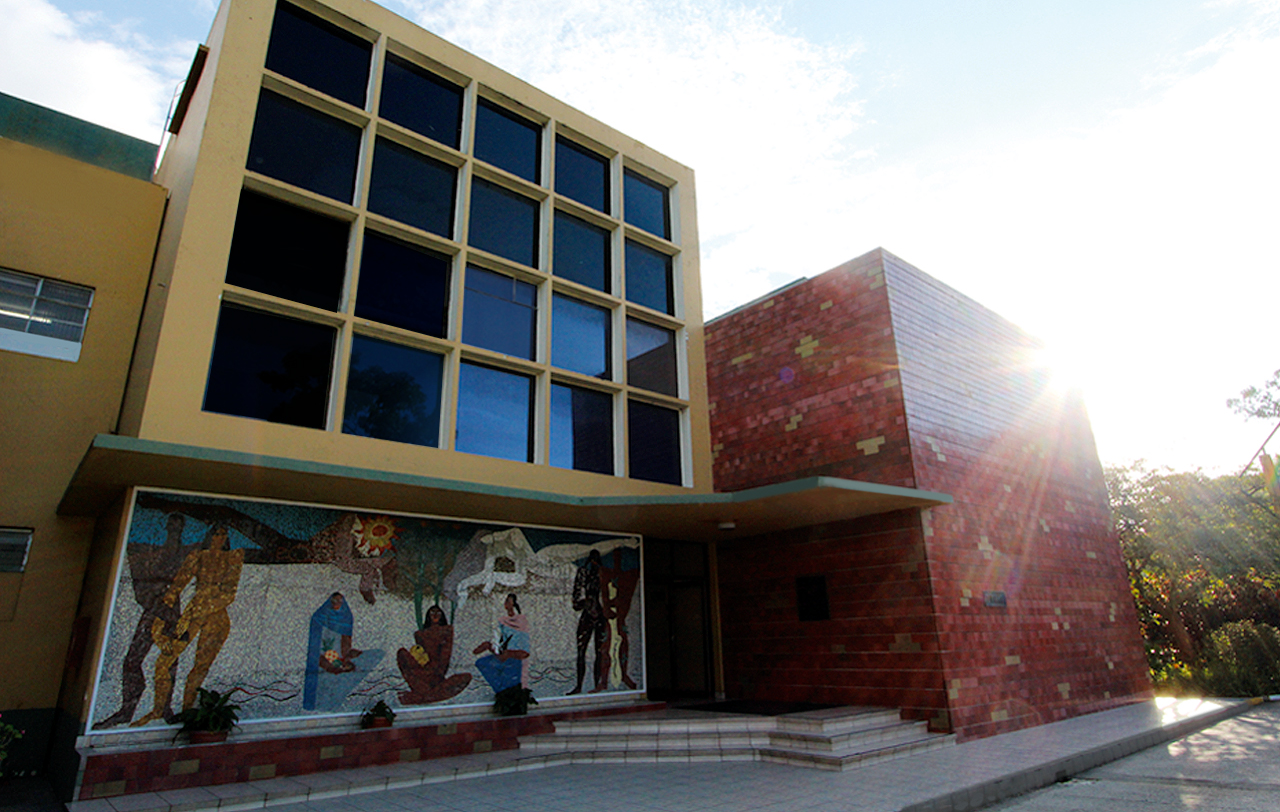 Edificio del Instituto de Nutrición de Centro América y Panamá (INCAP), centro especializado en alimentación y nutrición, Institución del Sistema de la Integración Centroamericana con sede en la ciudad de Guatemala.